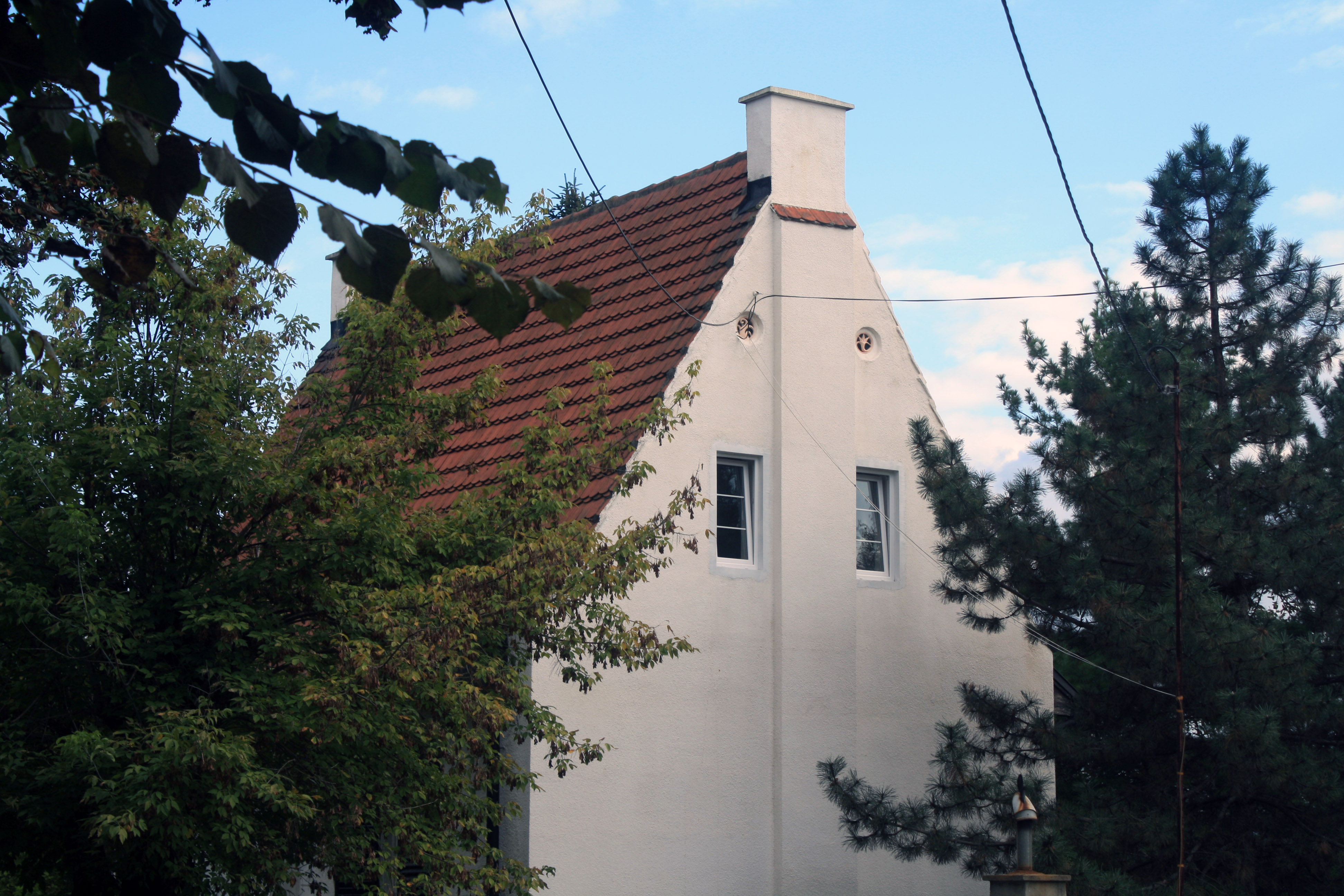 Кућа породице Поповић-Предић